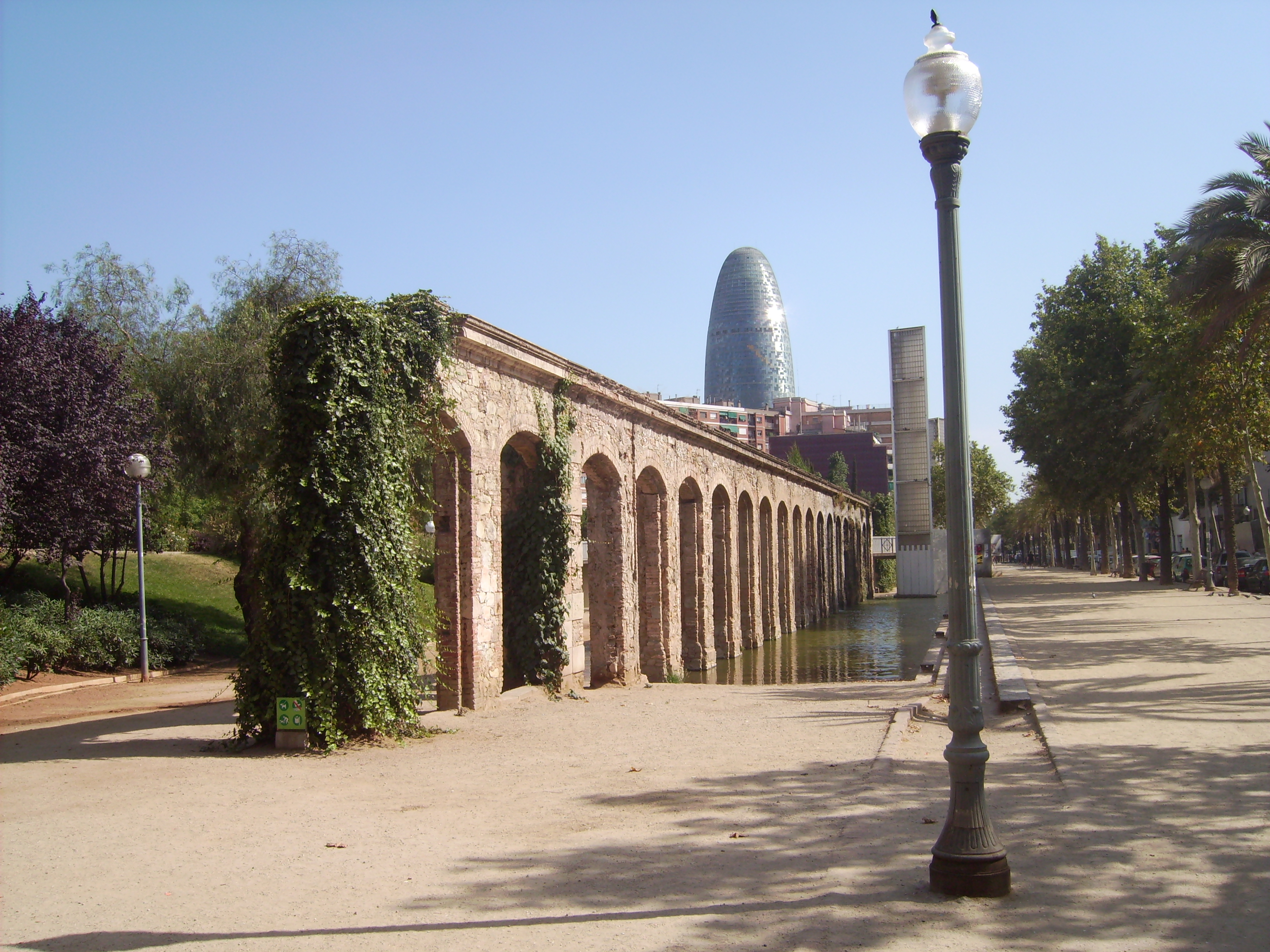 Parc del Clot, Barcelona (Catalonia)